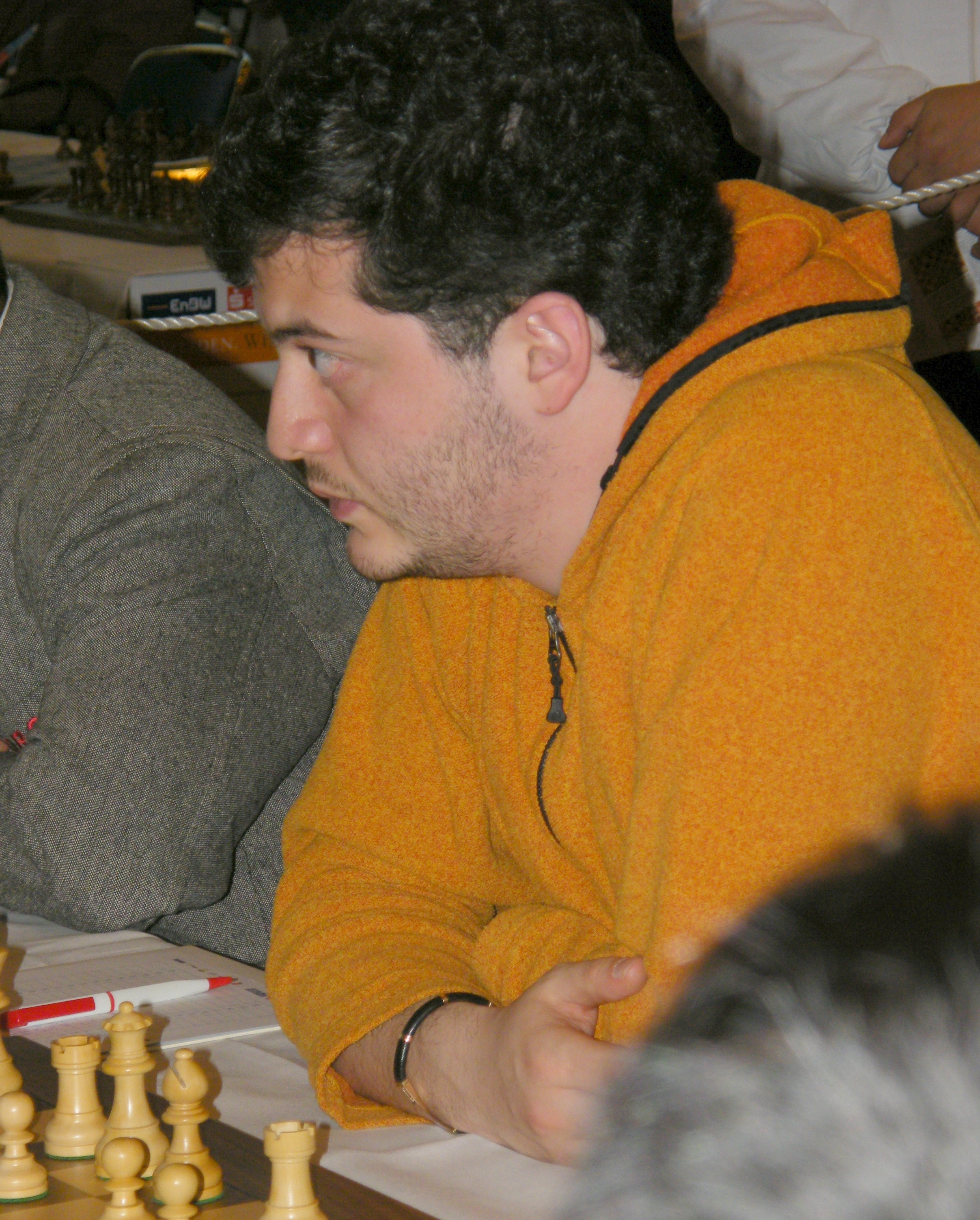 Levan Pantsulaia bei der 38. Schacholympiade in Dresden 2008